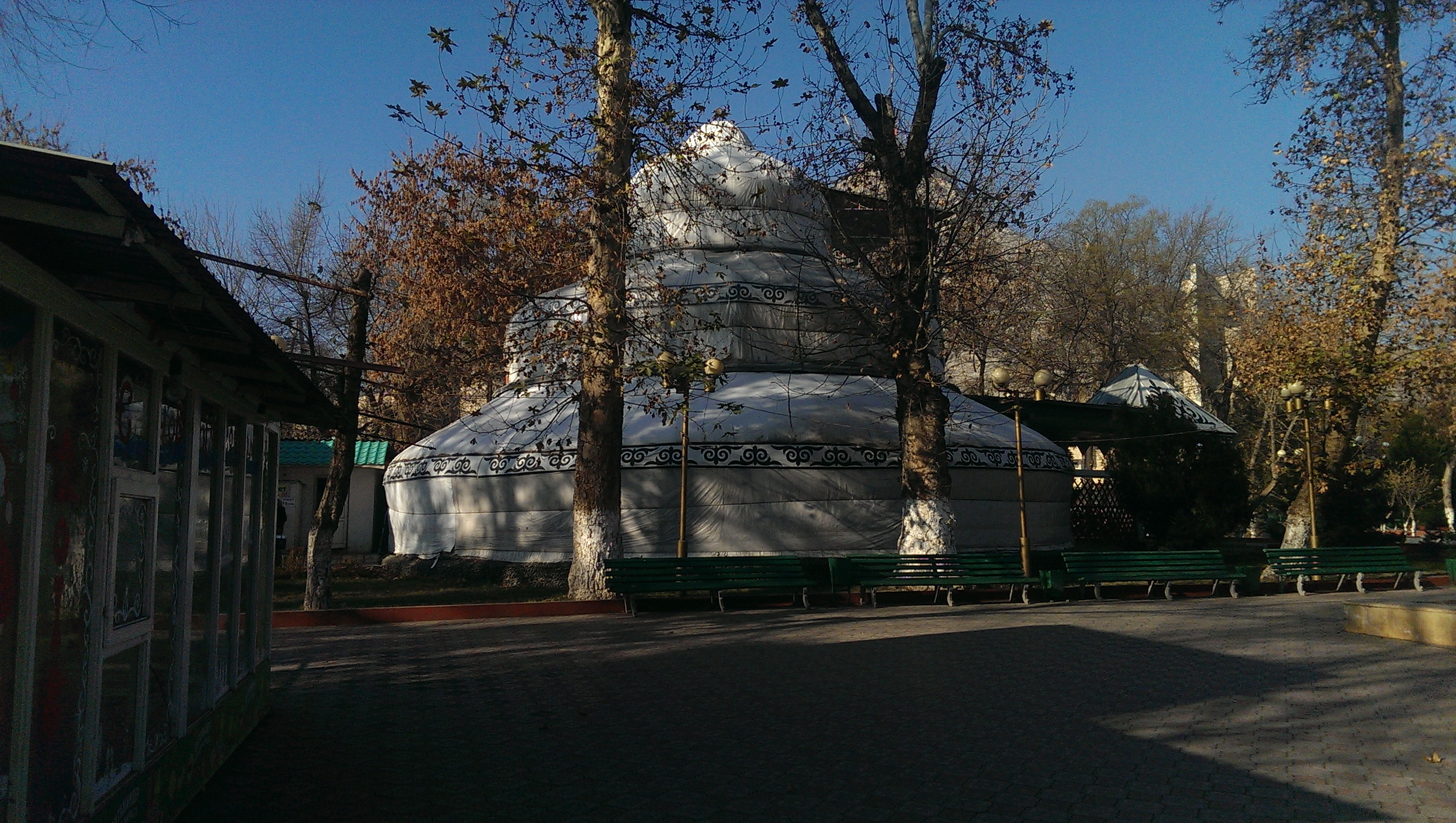 Юрта была построена по случаю празднования 1000-летия эпоса "Манас"